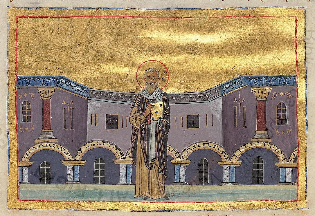 Ο άγιος Αμφιλόχιος Ικονίου. Святитель Амфилохий, епископ Иконийский Константинополь. 985 г. Миниатюра Минология Василия II. Ватиканская библиотека. Рим.